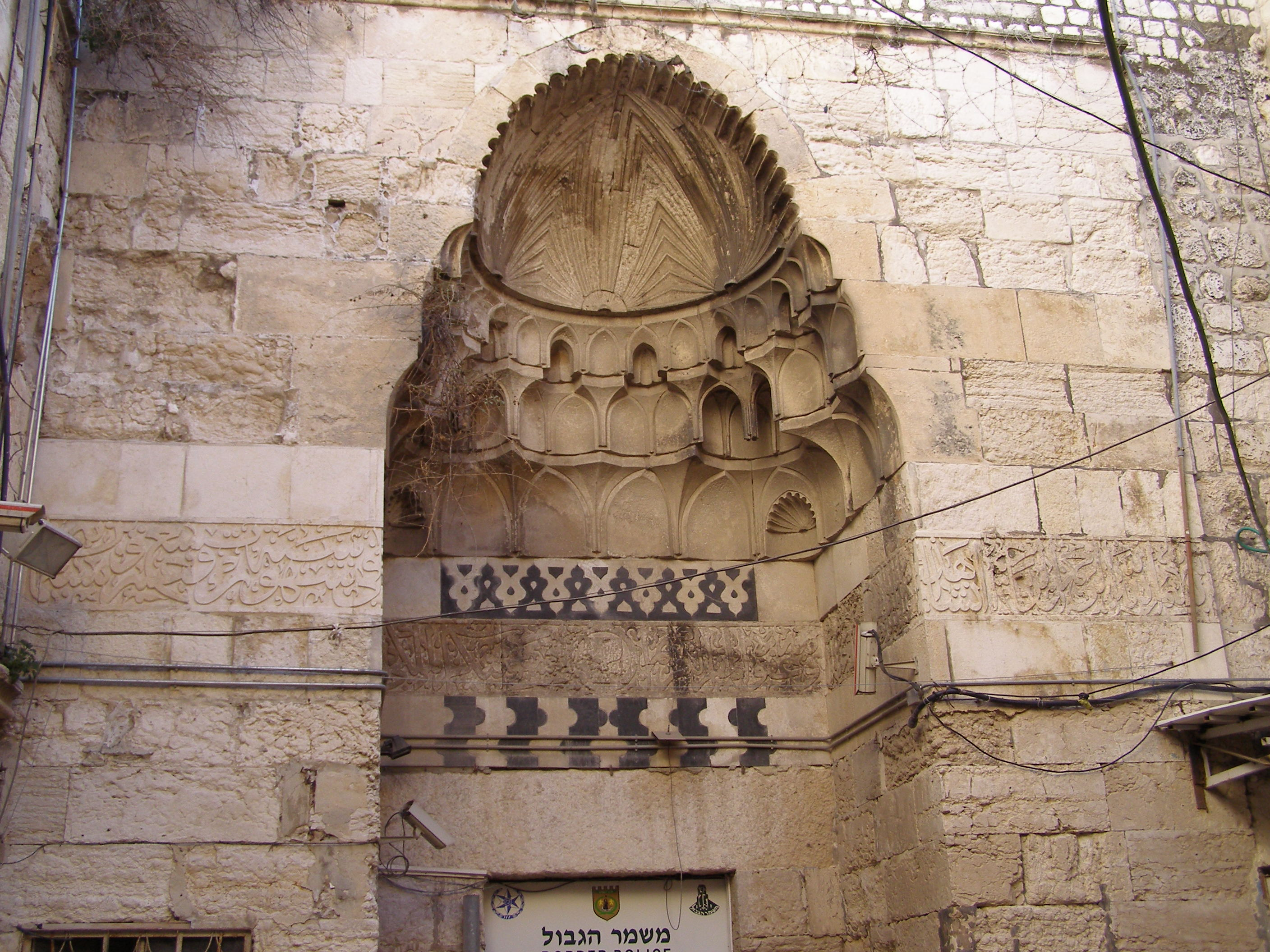 התנכיזיה (מחכמה)